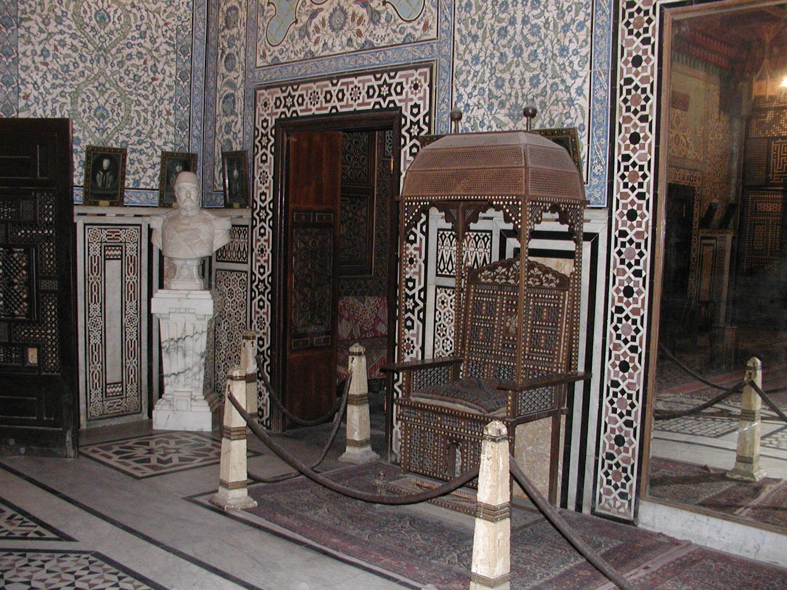 Salle du trône du Palais Al-Manyal, (Le Caire, Égypte).